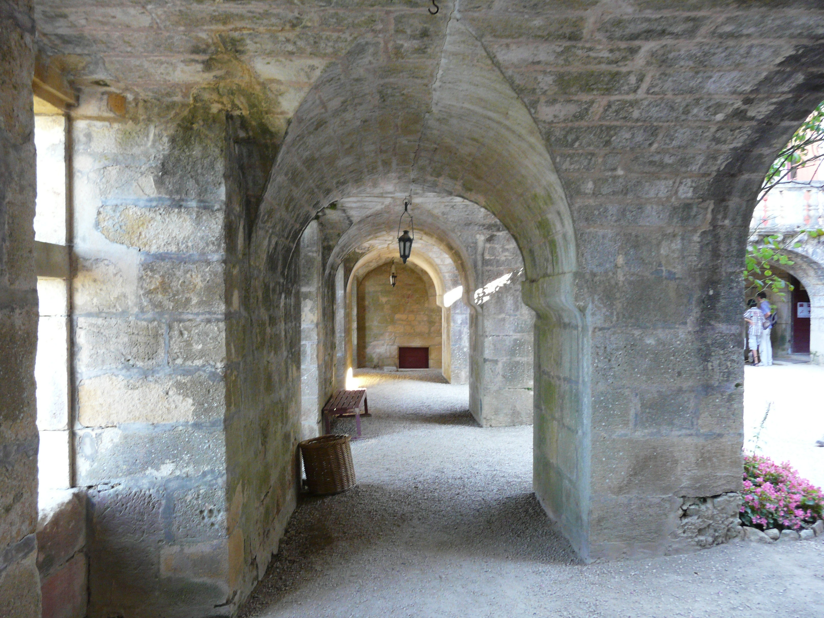 La voûte de la cour nord-est du château de Fénelon, Sainte-Mondane, Dordogne, France.